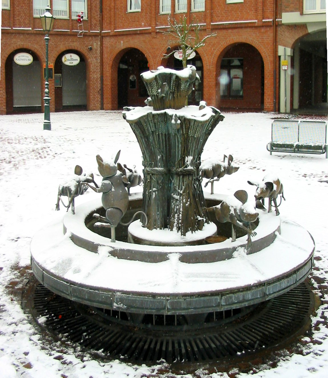 Übacher Mäuse am Brunnen